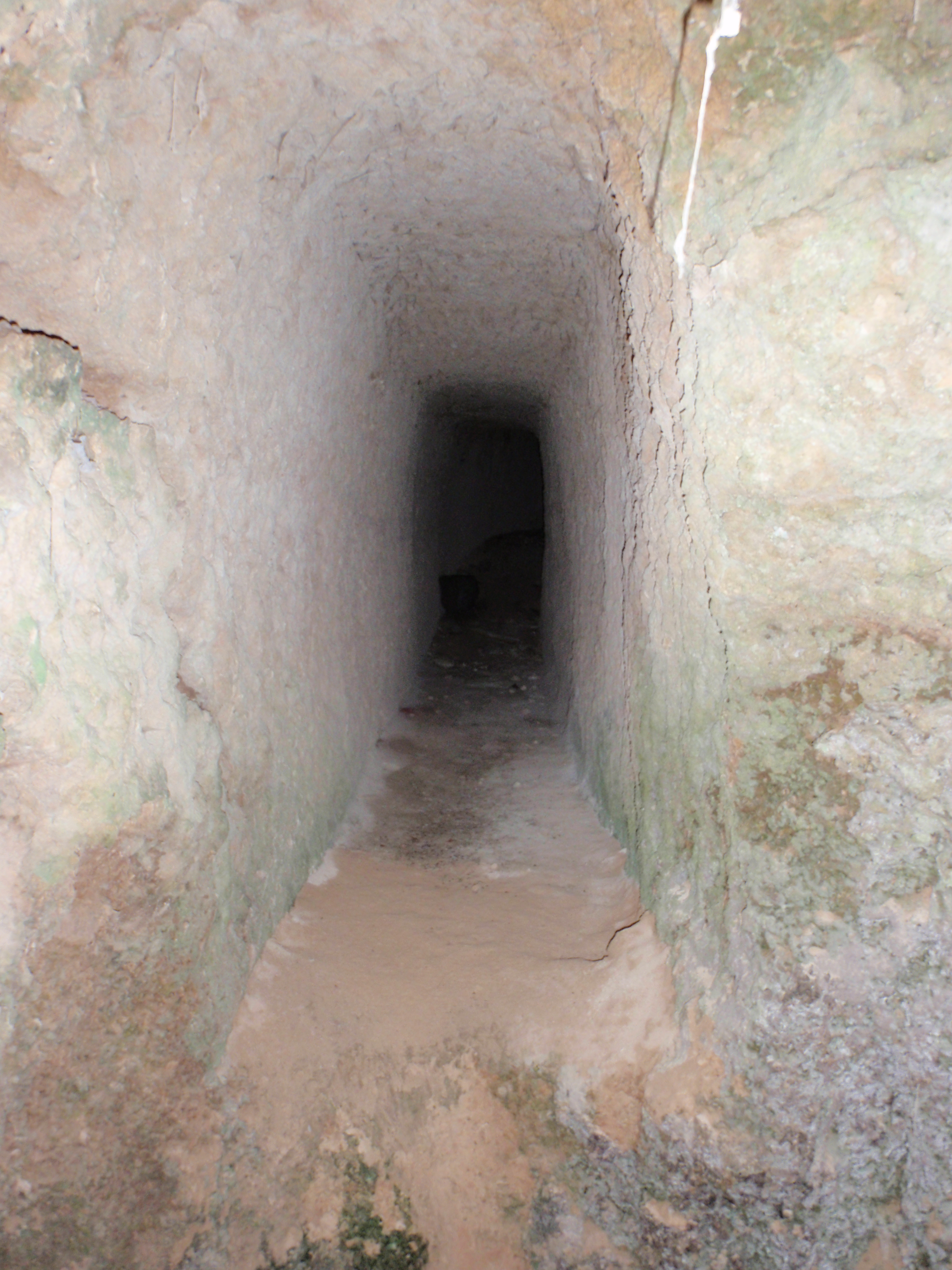 Canale sotterraneo di età medievale, scavato sotto il colle del castello di Militello in Val di Catania.Il canale, che presenta caratteristiche simili ai qanat di tradizione araba, si sviluppa per alcune decine di metri fino ad un vano cieco.